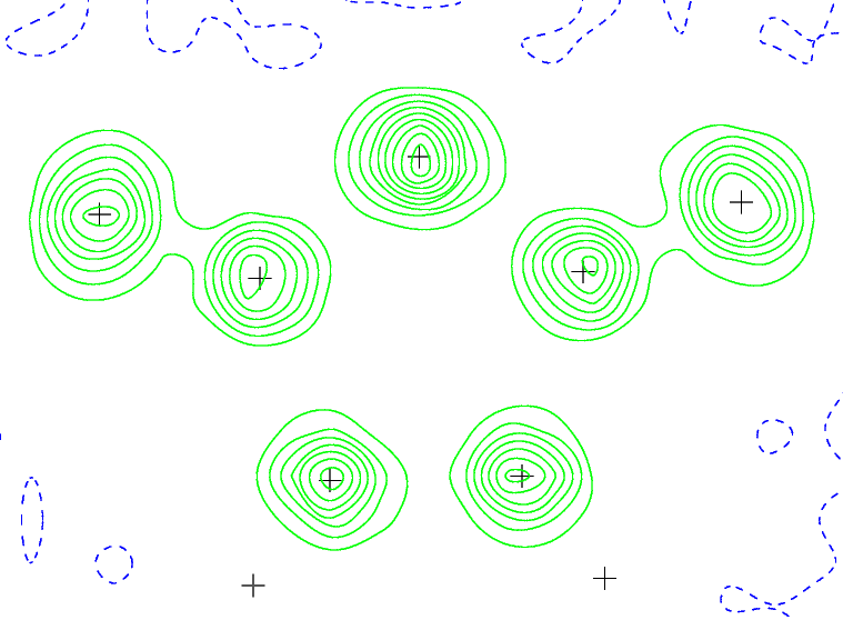 Elektronendichte von Maleinsäureanhydrid. Messtemperatur 130 K. Auflösung d = 0,54 Å. Kontourlinien gezeichnet mit 2,5 e/Å3.